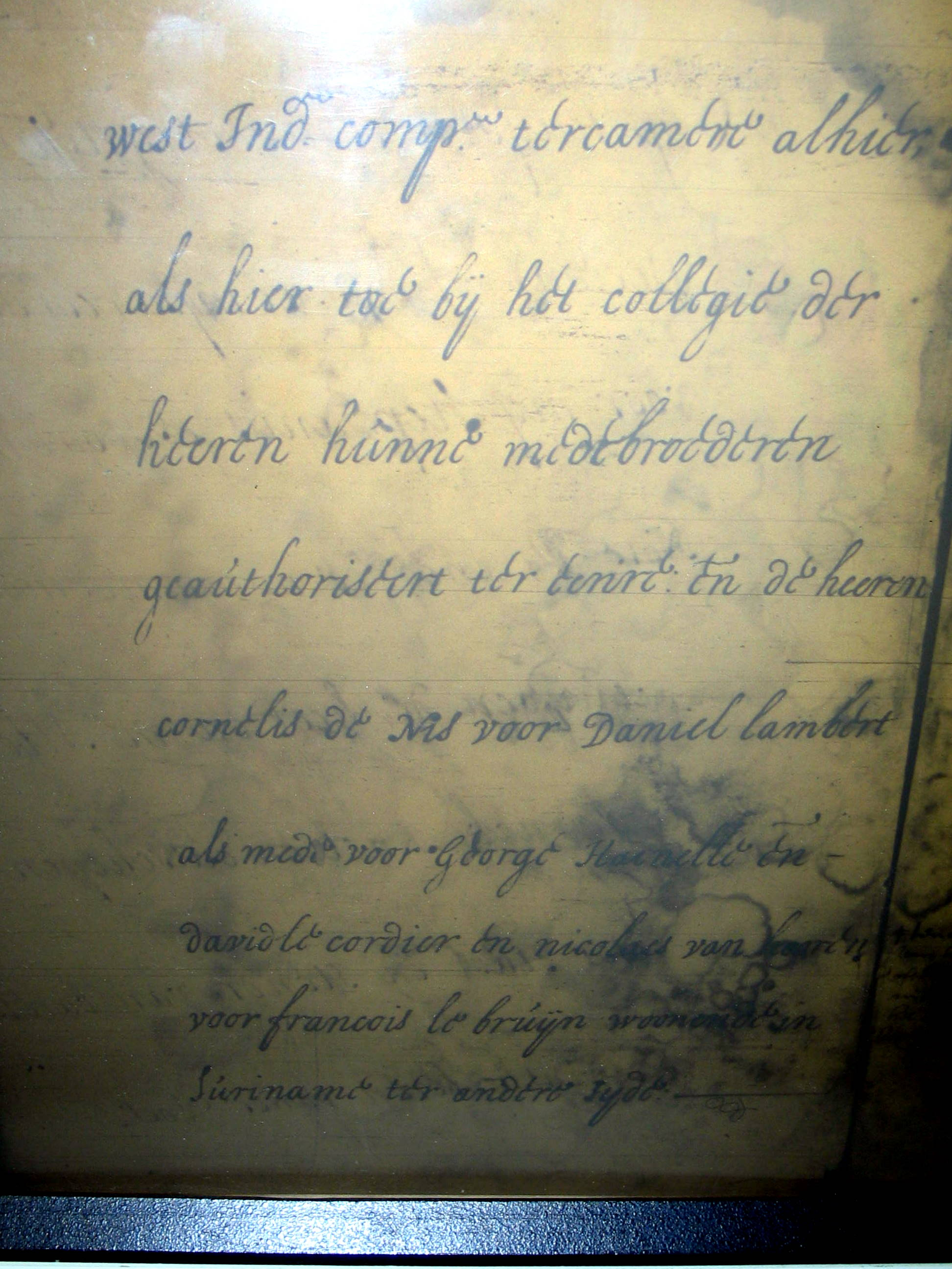 Akte waarin opdracht wordt gegeven 500 slaven te halen in Afrika en naar Suriname te vervoeren